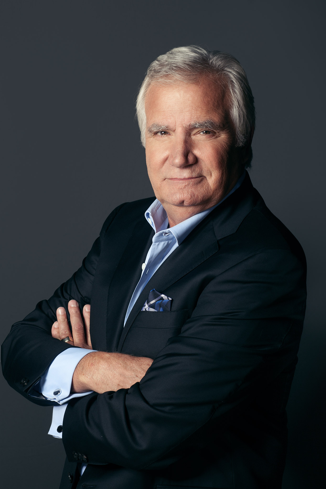 Amerikaans acteur